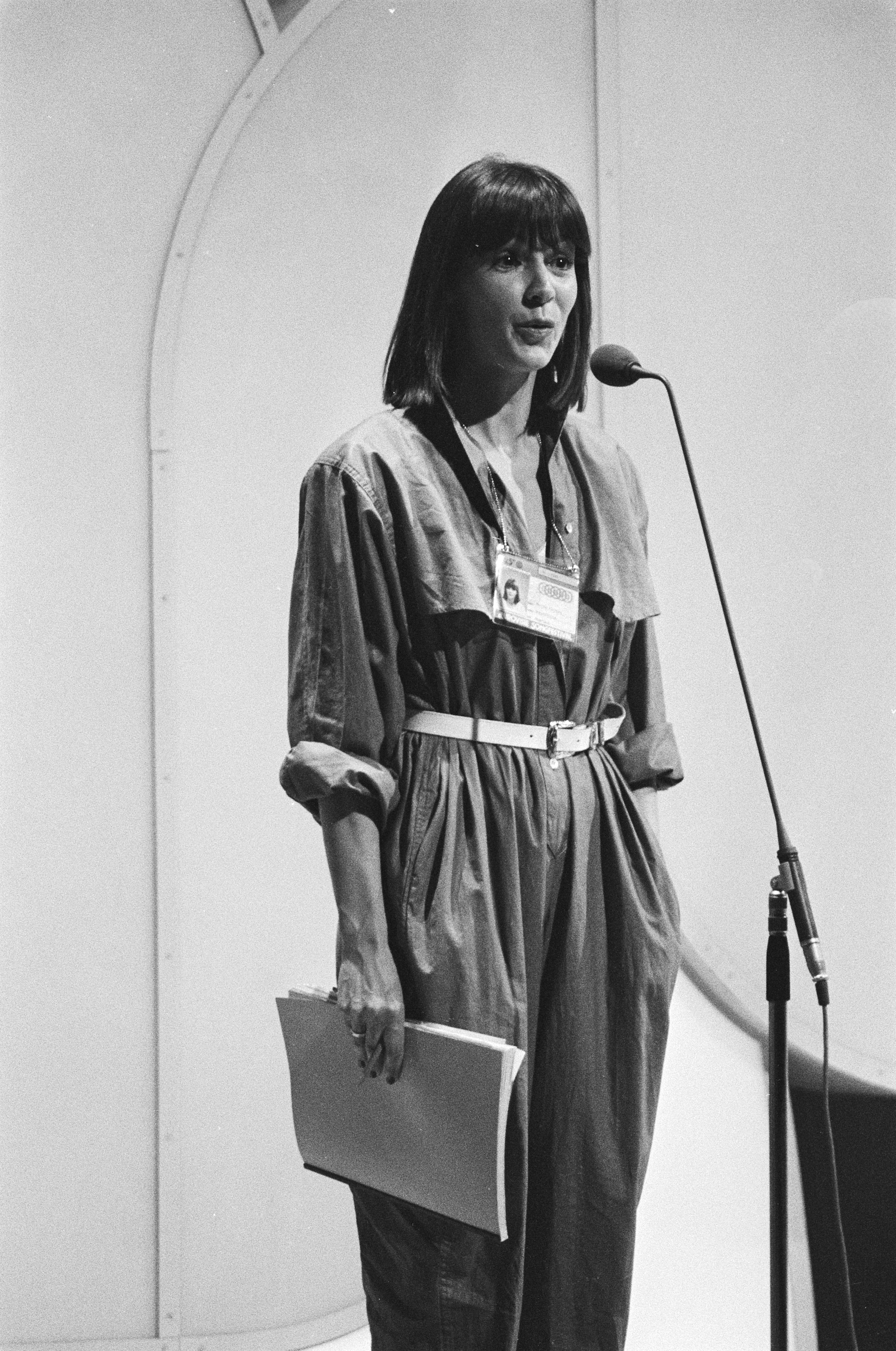 Collectie / Archief : Fotocollectie Anefo Reportage / Serie : [ onbekend ] Beschrijving : Eurovisie Songfestival, repetitie; presentatrice Marlous Fluitsma Datum : 17 april 1980 Trefwoorden : presentatrices, songfestivals Persoonsnaam : Fluitsma, Marlous Instellingsnaam : Eurovisie Song Festival Fotograaf : Dijk, Hans van / Anefo Auteursrechthebbende : Nationaal Archief Materiaalsoort : Negatief (zwart/wit) Nummer archiefinventaris : bekijk toegang 2.24.01.05 Bestanddeelnummer : 930-7752